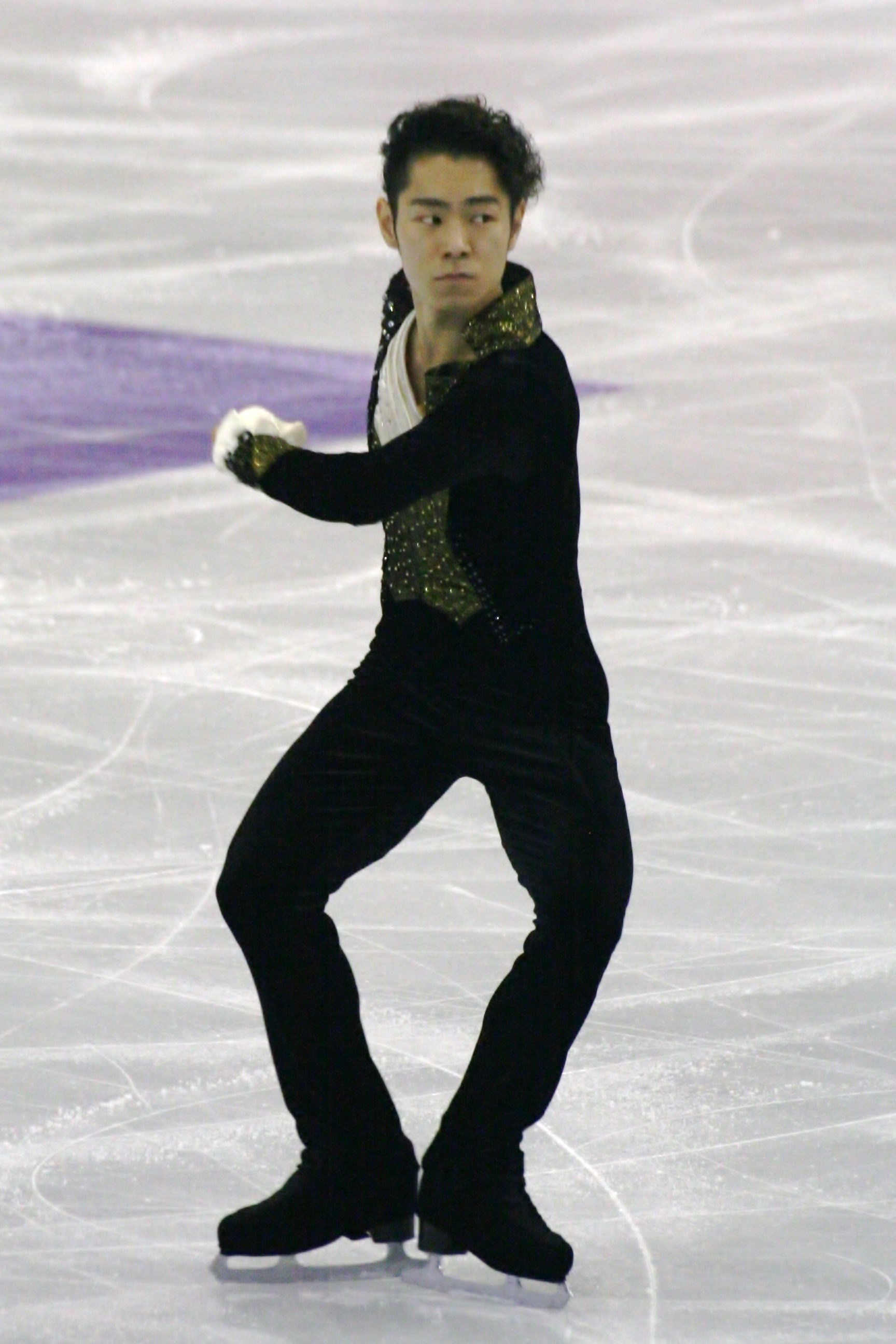 Дайсукэ Мураками (Япония) на финале Гран-при по фигурному катанию 2015-2016.